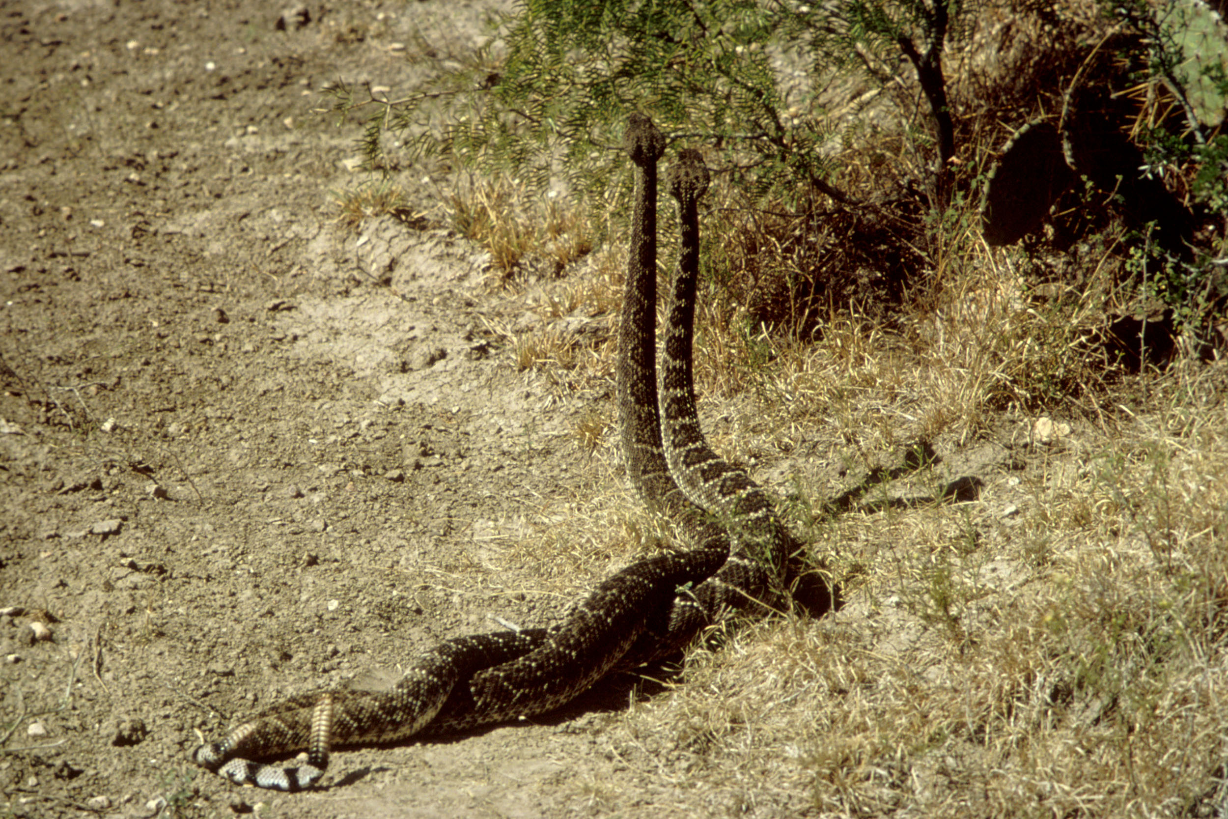 Crotalus-species